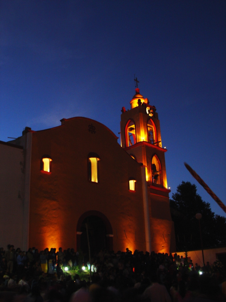 Vista Nocturna de la Parroquia de la Virgen del Pilar en Zaragoza, Puebla.